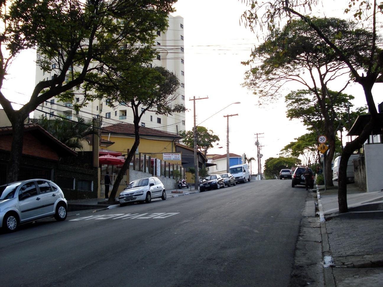 Avenida Águas de São Pedro, no bairro de Vila Paulicéia (distrito de Santana), zona norte de São Paulo, SP, Brasil.